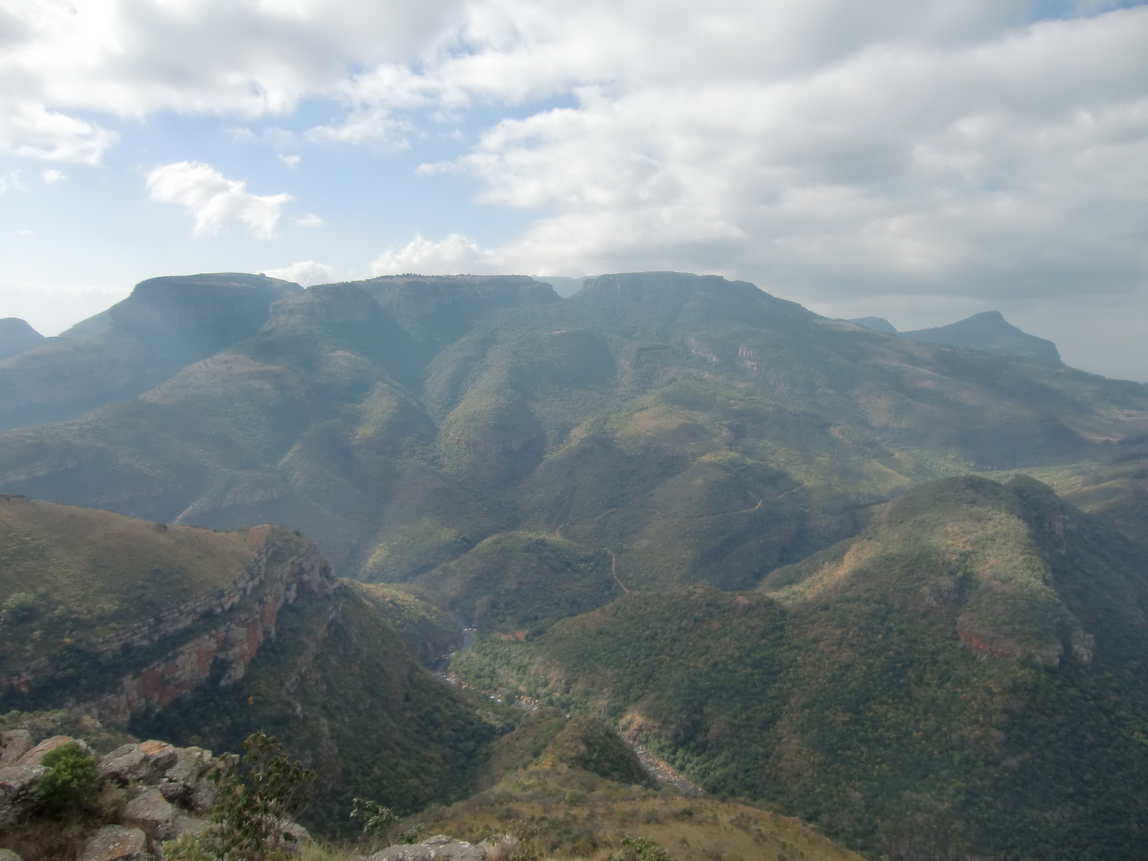 Lowveld View